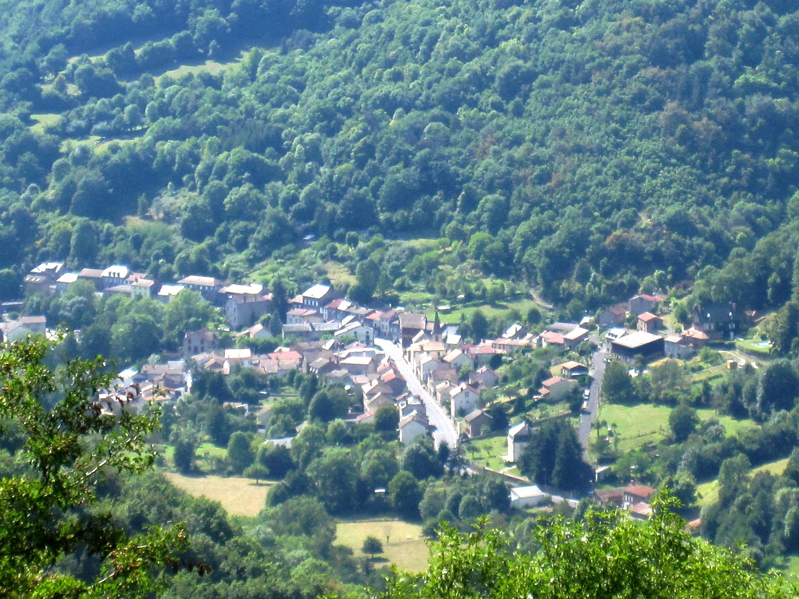 vue sur le village de ferières-saint-mary Cantal France